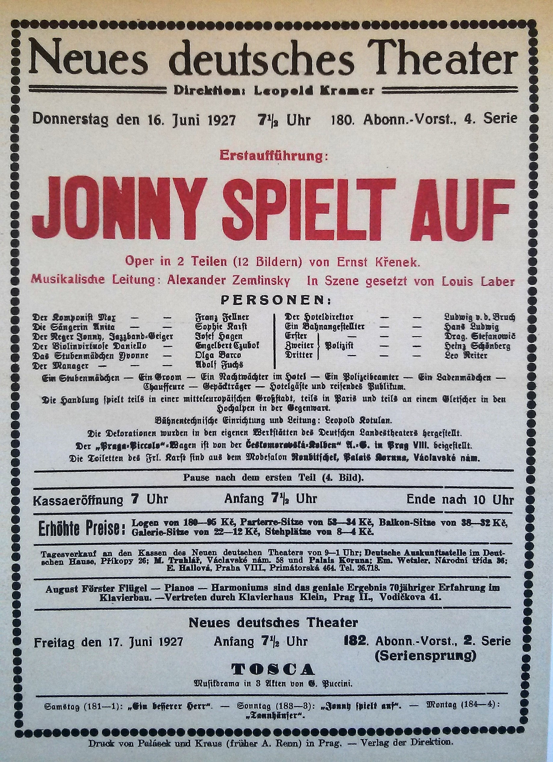 Divadelní plakát k premiéře